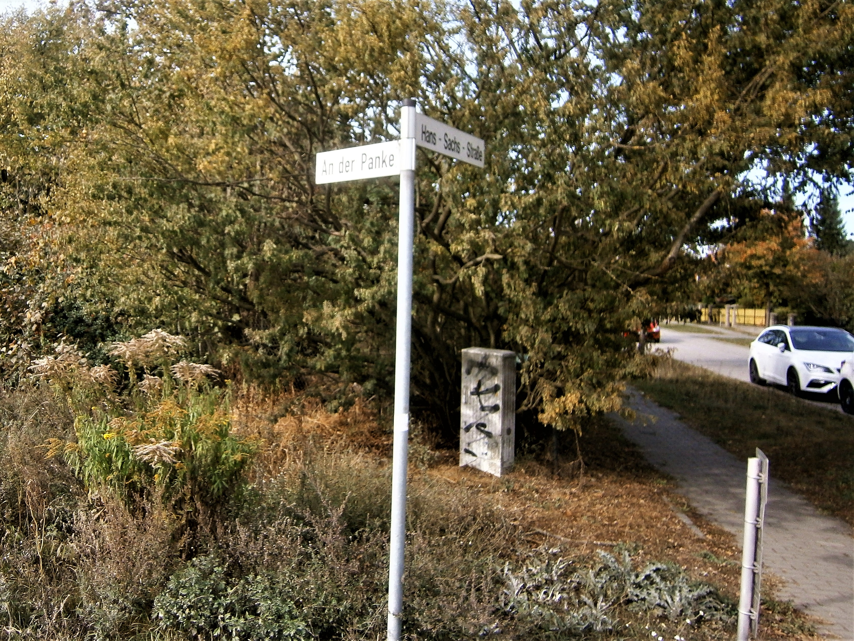 Das Straßenschild am Pankeweg und Adressangabe in Berlinau - Ortsteil Schönow, Siedlung Schönow-Süd ** Friedenstal.